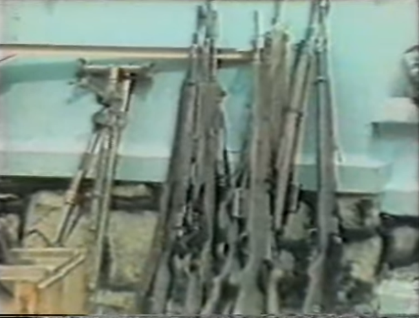 Armes capturées par les forces armées zaïroises sur le FLNC pendant la première guerre du Shaba. Extrait du reportage "Mobutu Sese Seko : bâtisseur du Zaïre nouveau", 1985, diffusé via la RTBF